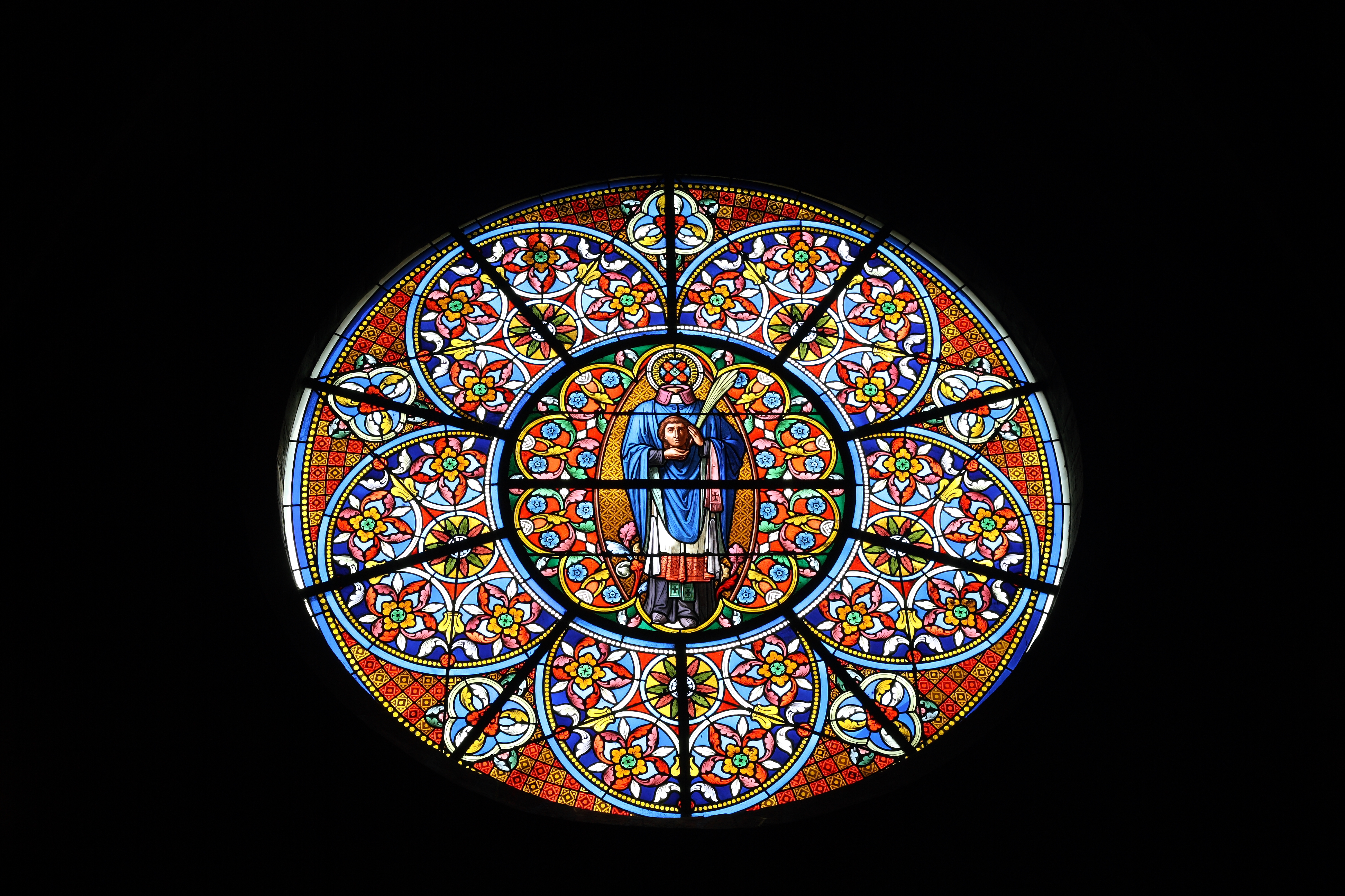 Katholische Pfarrkirche Saint-Clément in Arpajon im Département Essonne (Île-de-France), Bleiglasfenster, Darstellung: hl. Yon, Begleiter des hl. Dionysius von Paris